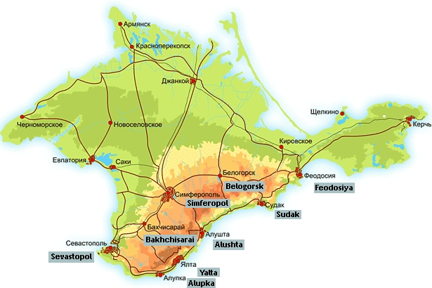 Mapa de Crimea.